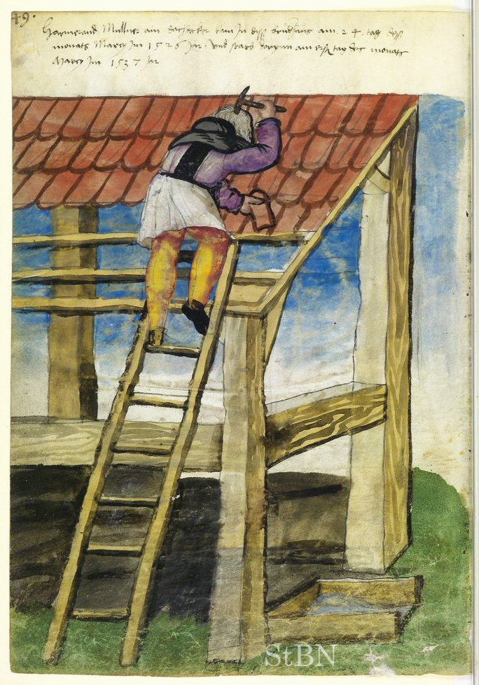 Transkription und weitere Informationen Haymerand (Heimerand) Mullner (Müllner), dachdecker (Dachdecker)